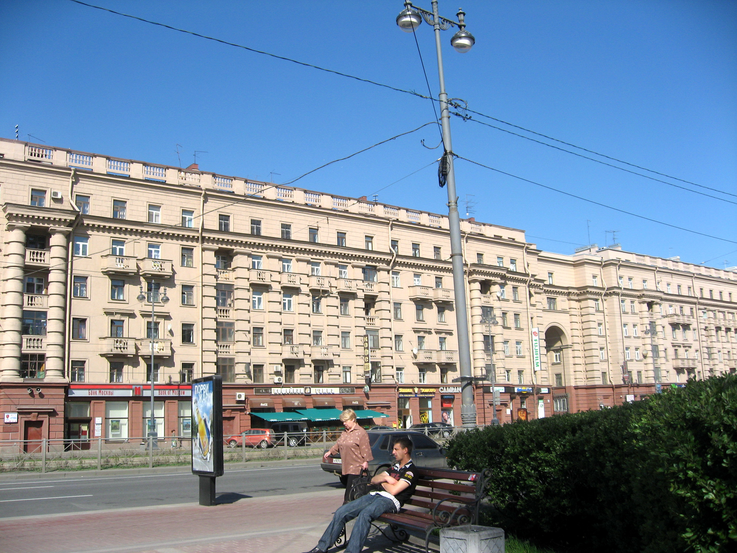 Sankt-Petěrburg (Petrohrad)